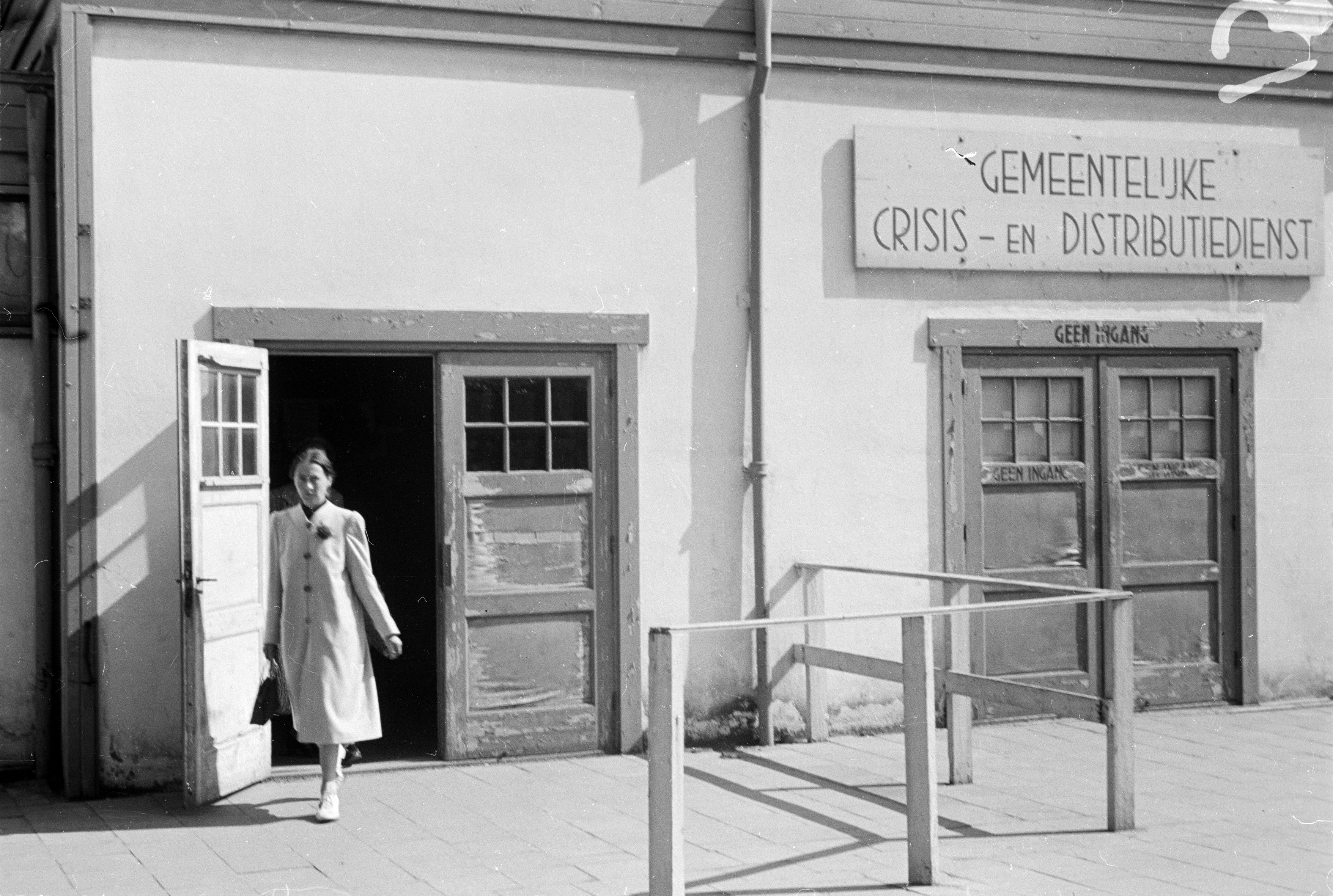 Foto uit de collectie Huizinga van het NIOD. Exterieur van de Gemeentelijke Crisis- en Distributiedienst. Menno Huizinga was onderdeel van de Ondergedoken Camera en maakte illegaal foto’s tijdens de bezetting. Dit deed hij hoofdzakelijk in zijn woonplaats Den Haag.